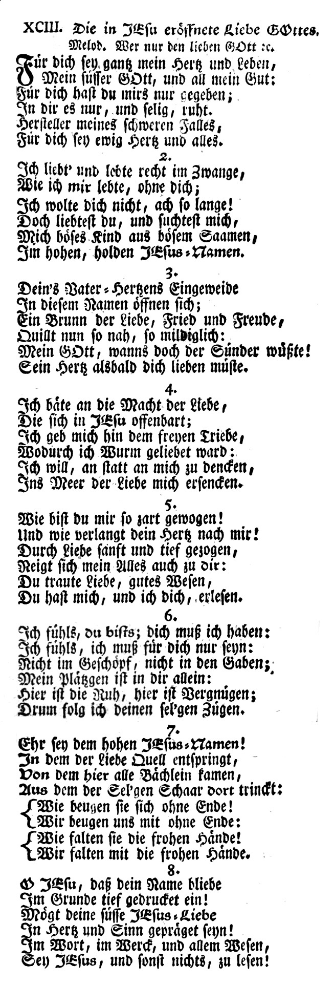 Für dich sei ganz mein Herz und Leben mit der Strophe Ich bete an die Macht der Liebe; Erstdruck 1757